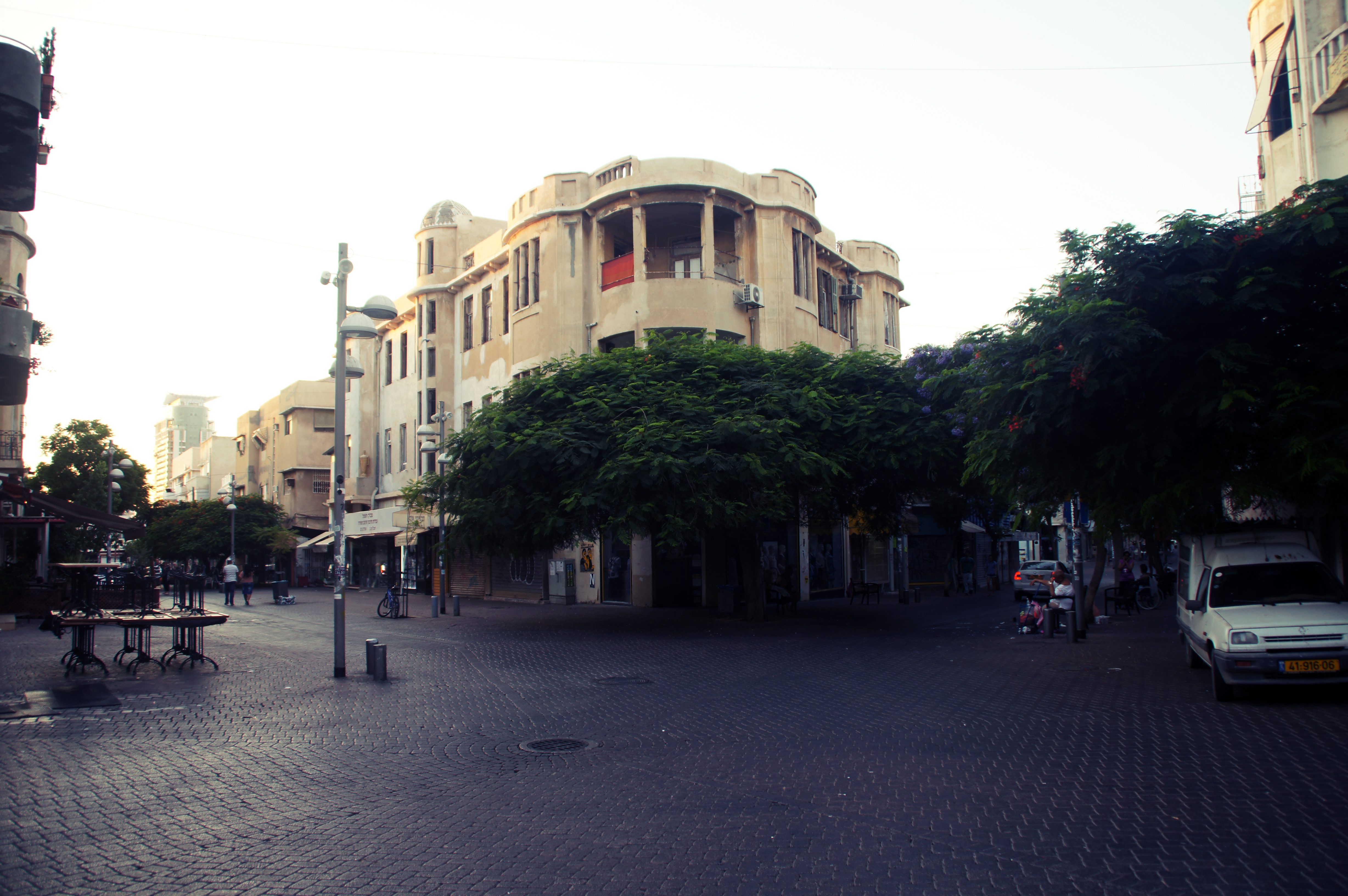 שכונת נחלת בנימין קמה ב-5 בדצמבר 1909 במקביל לאחוזת בית. השכונה כללה רחוב אחד, המקביל לרחוב הרצל.